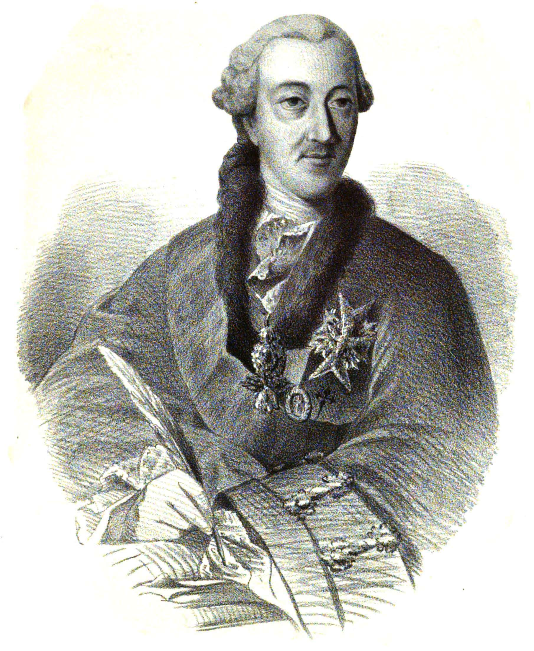 Retrato de Joaquín Atanasio Pignatelli de Aragón y Moncayo (1724-1776), XVI conde de Fuentes y IV marqués de Coscojuela